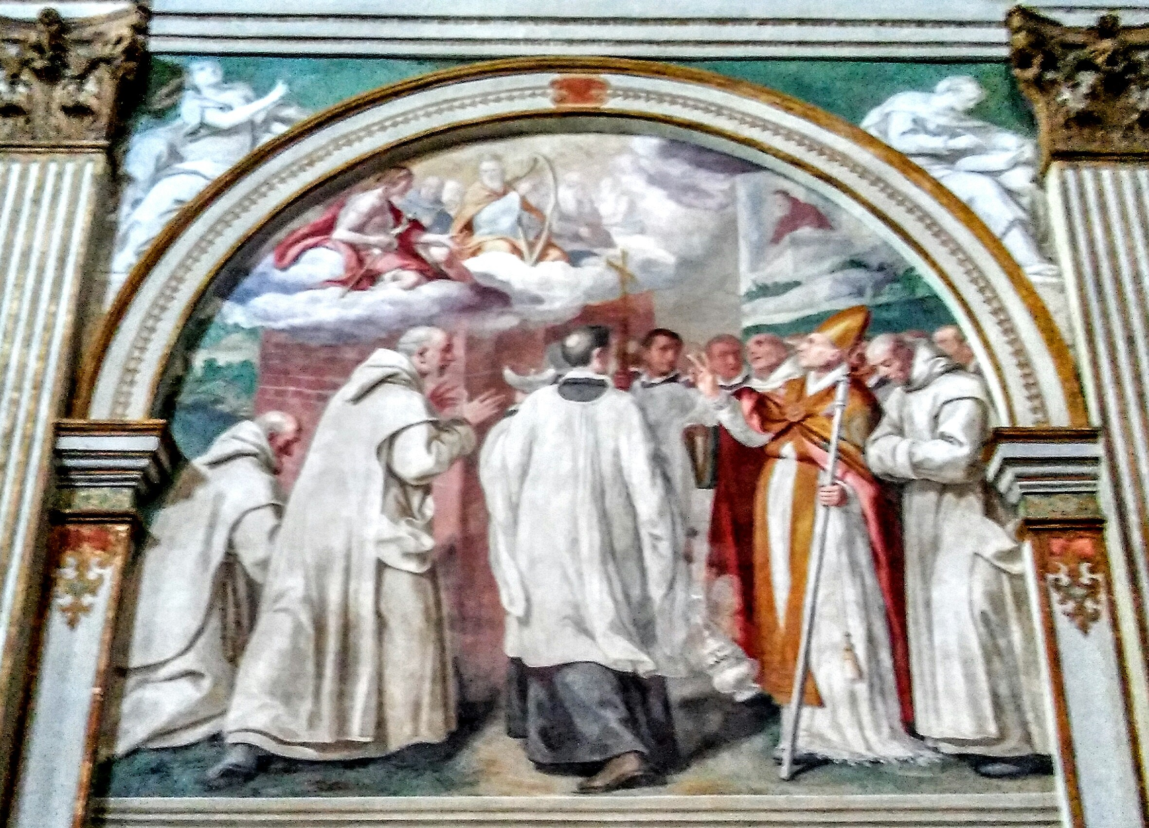 Affreschi nella Certosa di Garegnano: Ugo di Grenoble benedice la fondazione del monastero della Certosa di Daniele Crespi